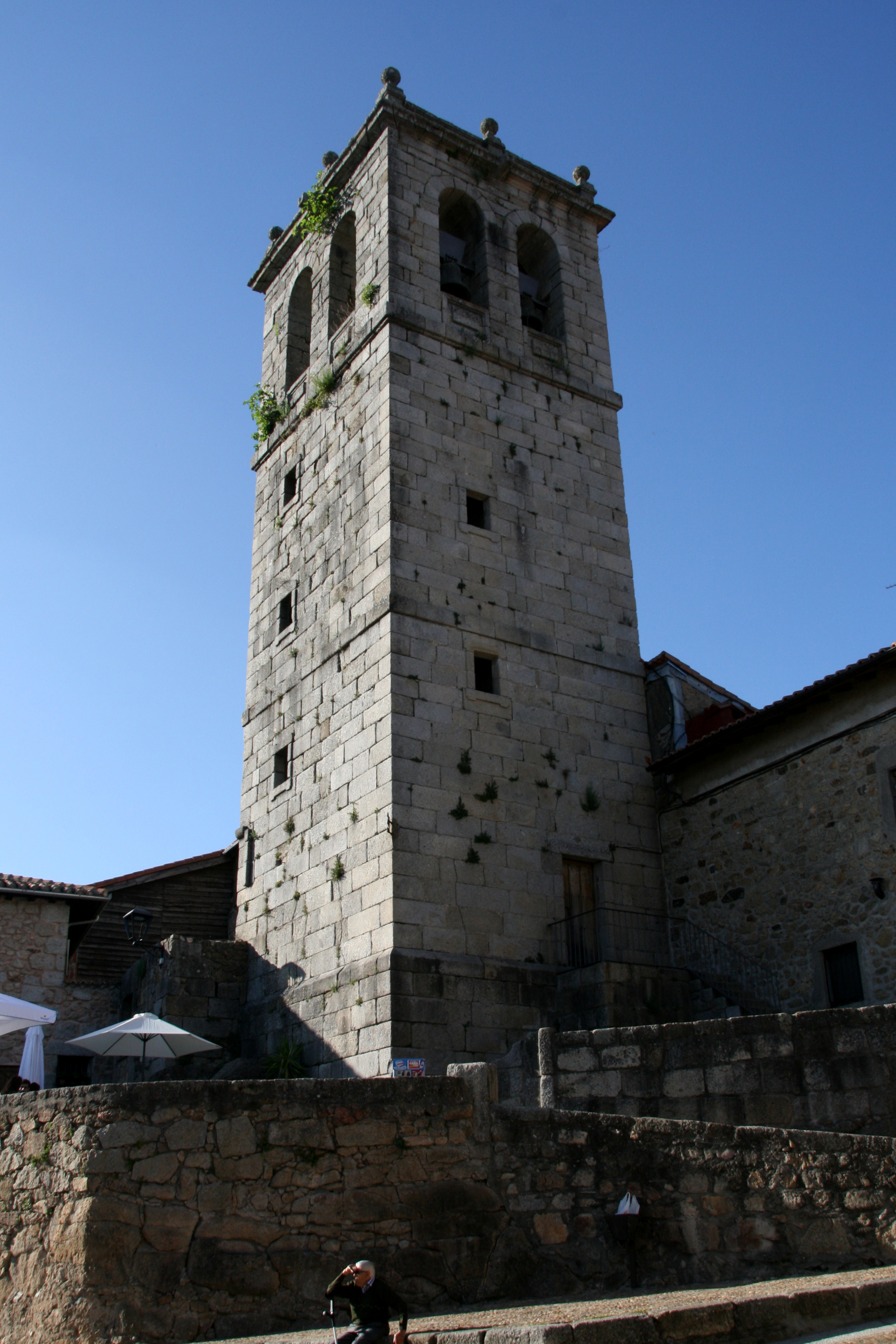 Iglesia parroquial de Santiago y San Ginés de Arlés en Miranda del Castañar